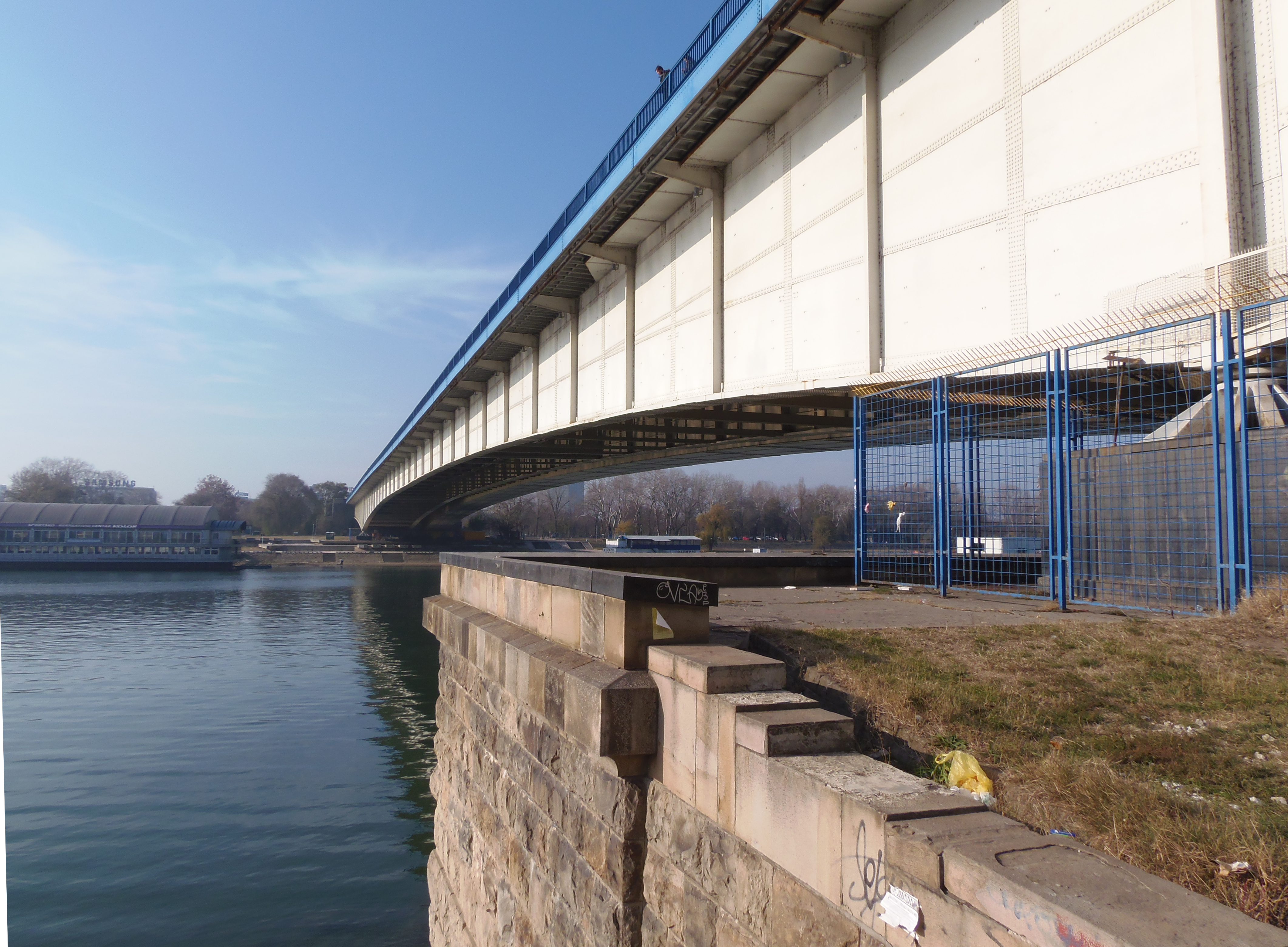 Бранков мост у Београду. Бочни поглед са десне стране Саве. (Србија)